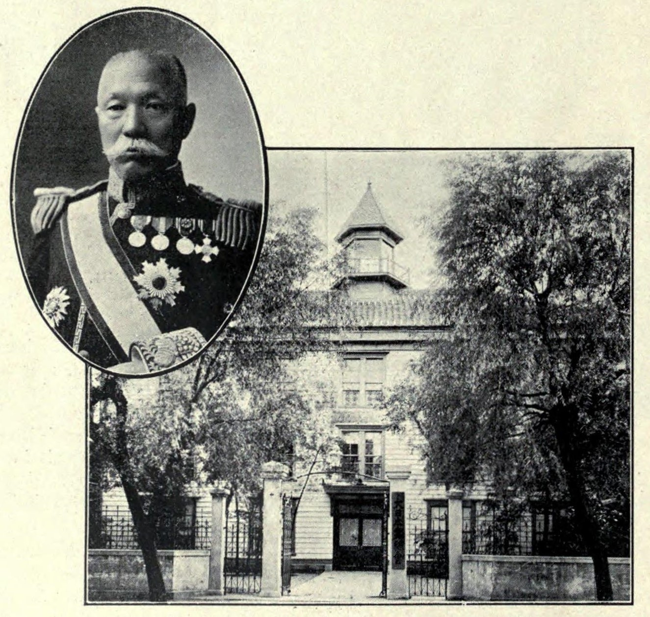 大日本蚕糸会頭男爵松平正直